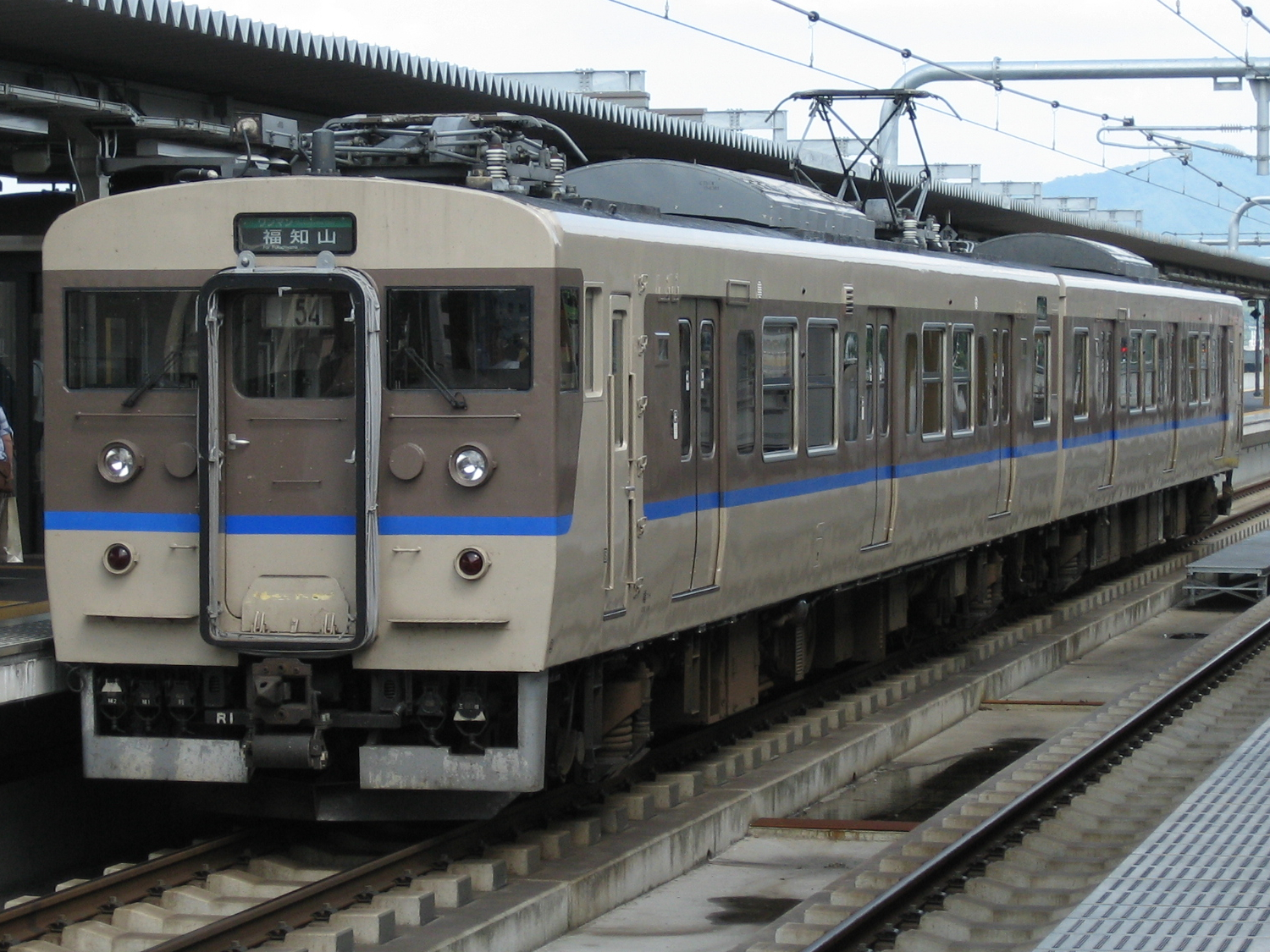 2006年8月21日に福知山駅で投稿者が撮影。福知山運転所（現・福知山電車区）R1編成、クモハ114形6123号。